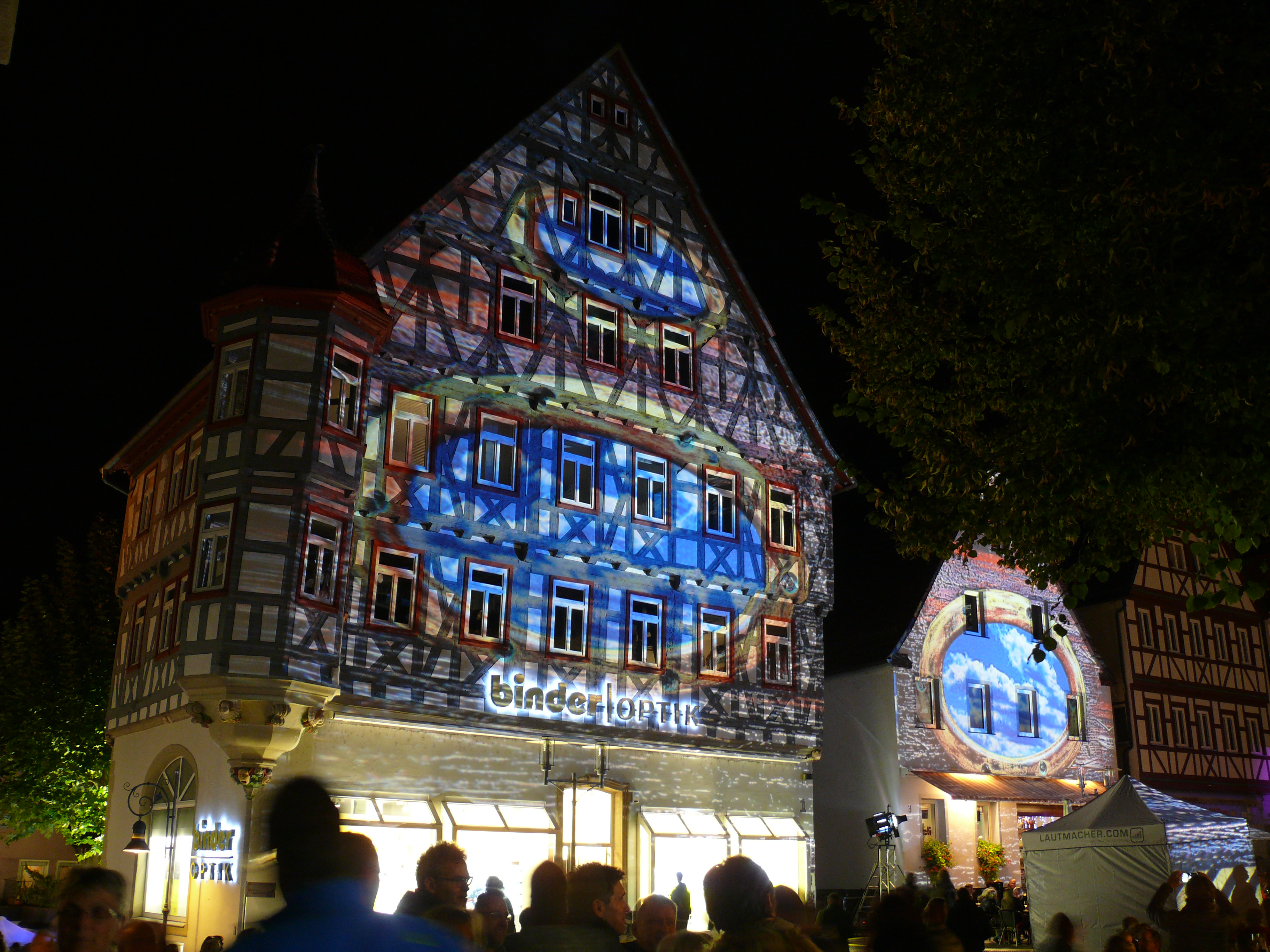 Die Nordwestseite vom Waiblinger Marktplatz im Rahmen von "Waiblingen leuchtet".